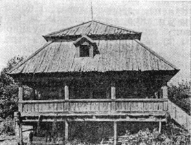 Комора в Покорщині: Фотографія Комори в Покорщині